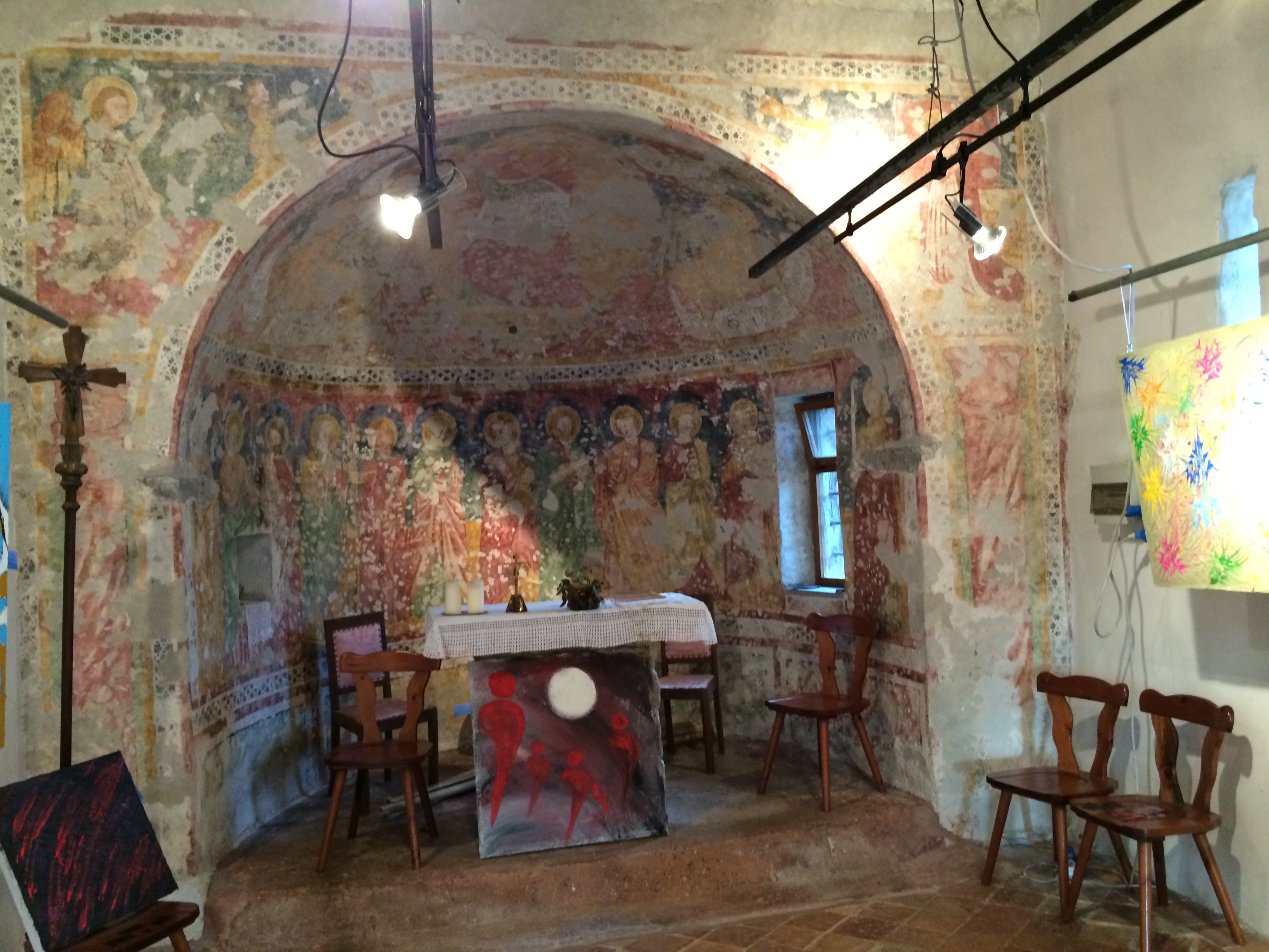 Moimacco